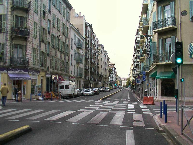 Nice-Quartier des Musiciens Rue de la Buffa